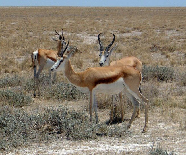 Springböcke im Etosha-Nationalpark (Namibia)